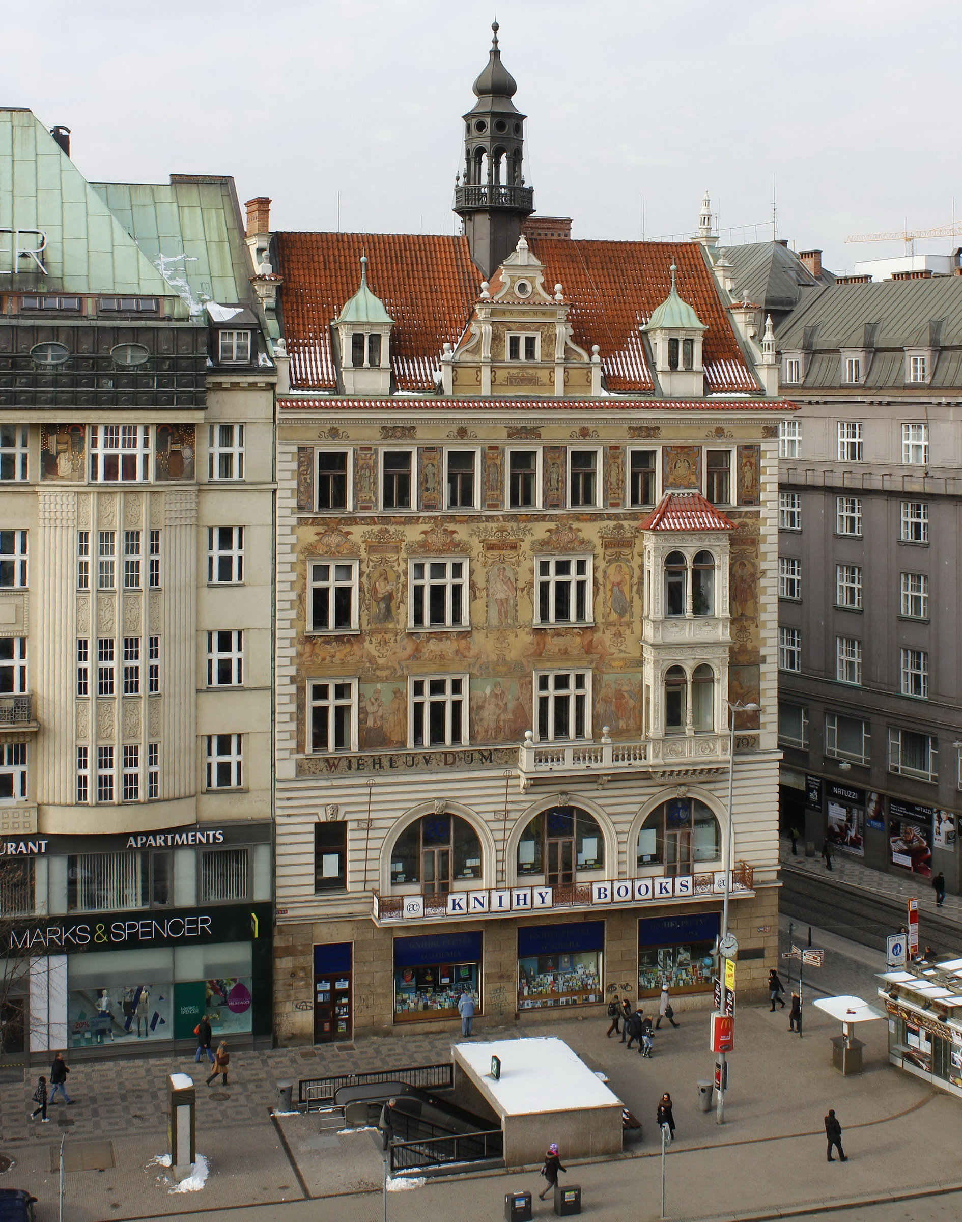 Antonín Wiehl: Wiehlův dům, Praha 1 - Nové Město, čp. 792, Václavské náměstí 34 (1895-1896)